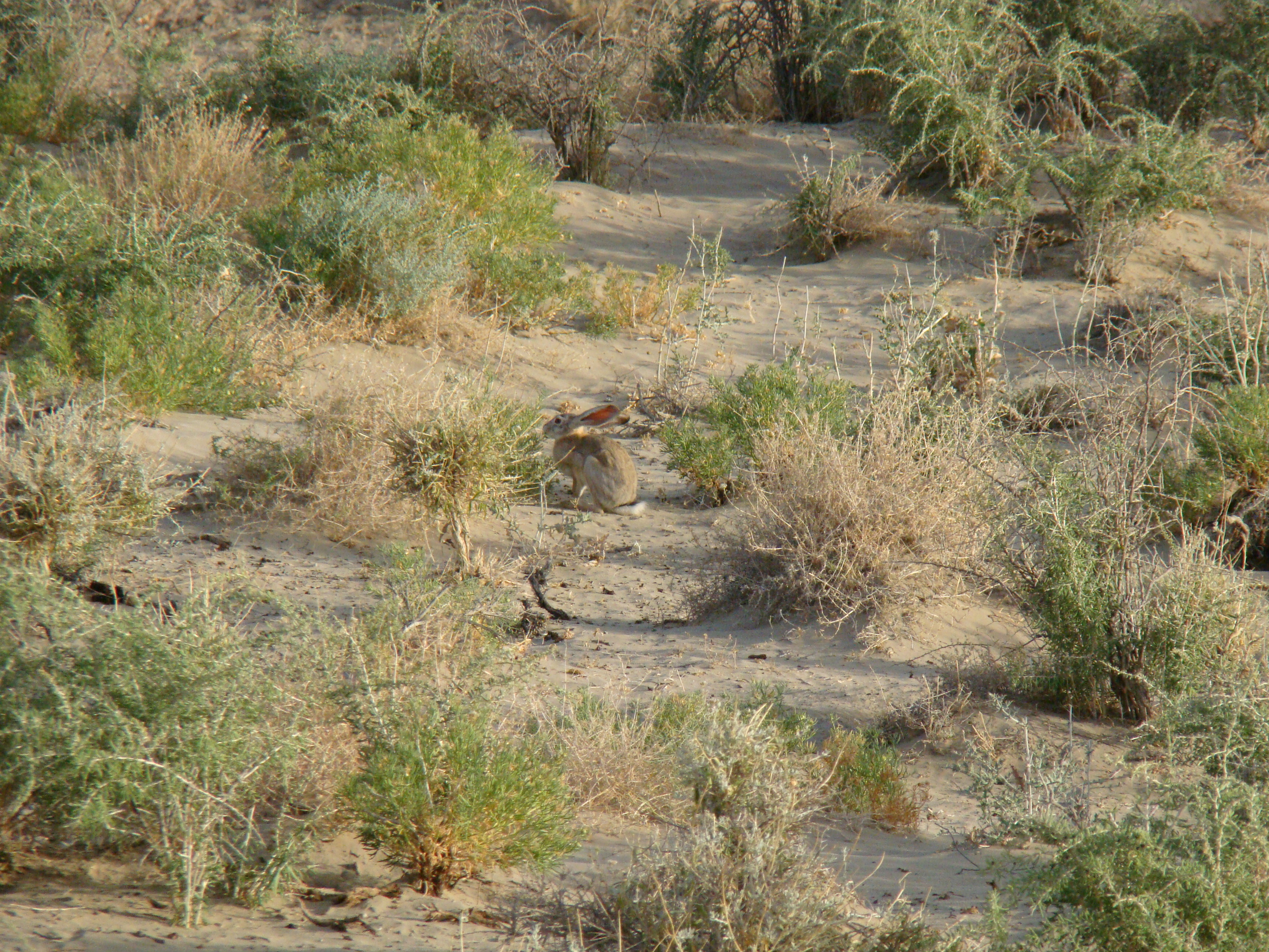 Заяц-толай (Lepus tolai). Город Байконур, Кызылординская область, Казахстан